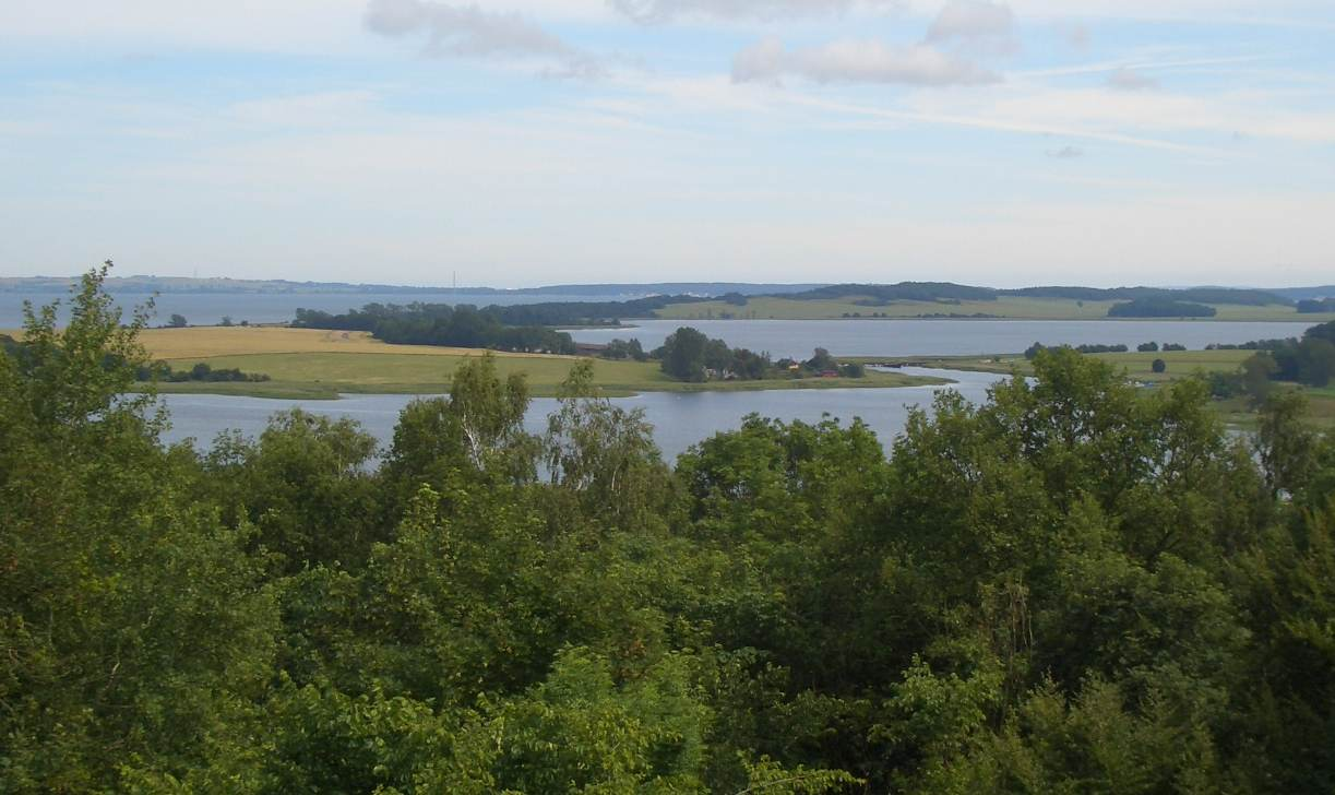 Naturschutzgebiet Tetzitzer See mit Halbinsel Liddow und Banzelvitzer Berge. Zu erkennen sind: links die Halbinsel Liddow, im zentralen Teil der Tetzitzer See mit Verbindung zum Großen Jasmunder Bodden und Brücke sowie hinten rechts die Banzelvitzer Berge. Die Aufnahme entstand vom Grümbke-Turm.